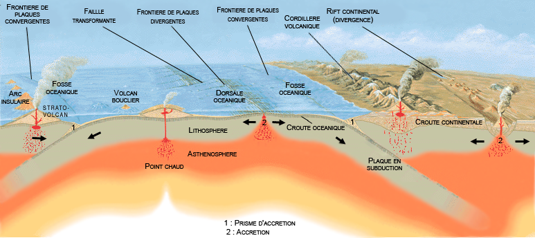 Schéma représentant les mouvements des plaques tectoniques